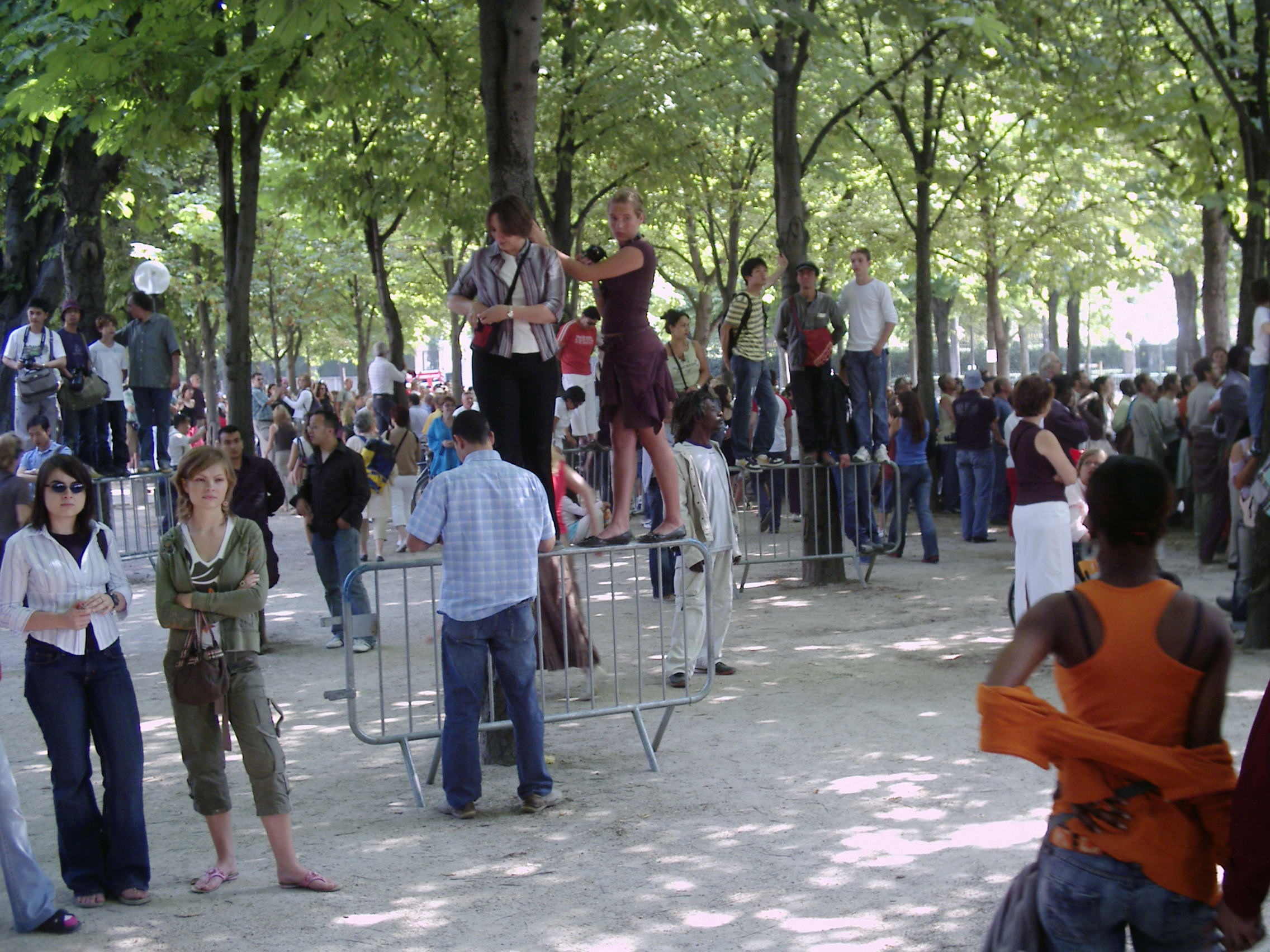 Pour mieux voir le défilé militaire du 14 juillet 2006, des spectateurs montent sur des barrières de police en bordure du jardins des Champs-Élysées